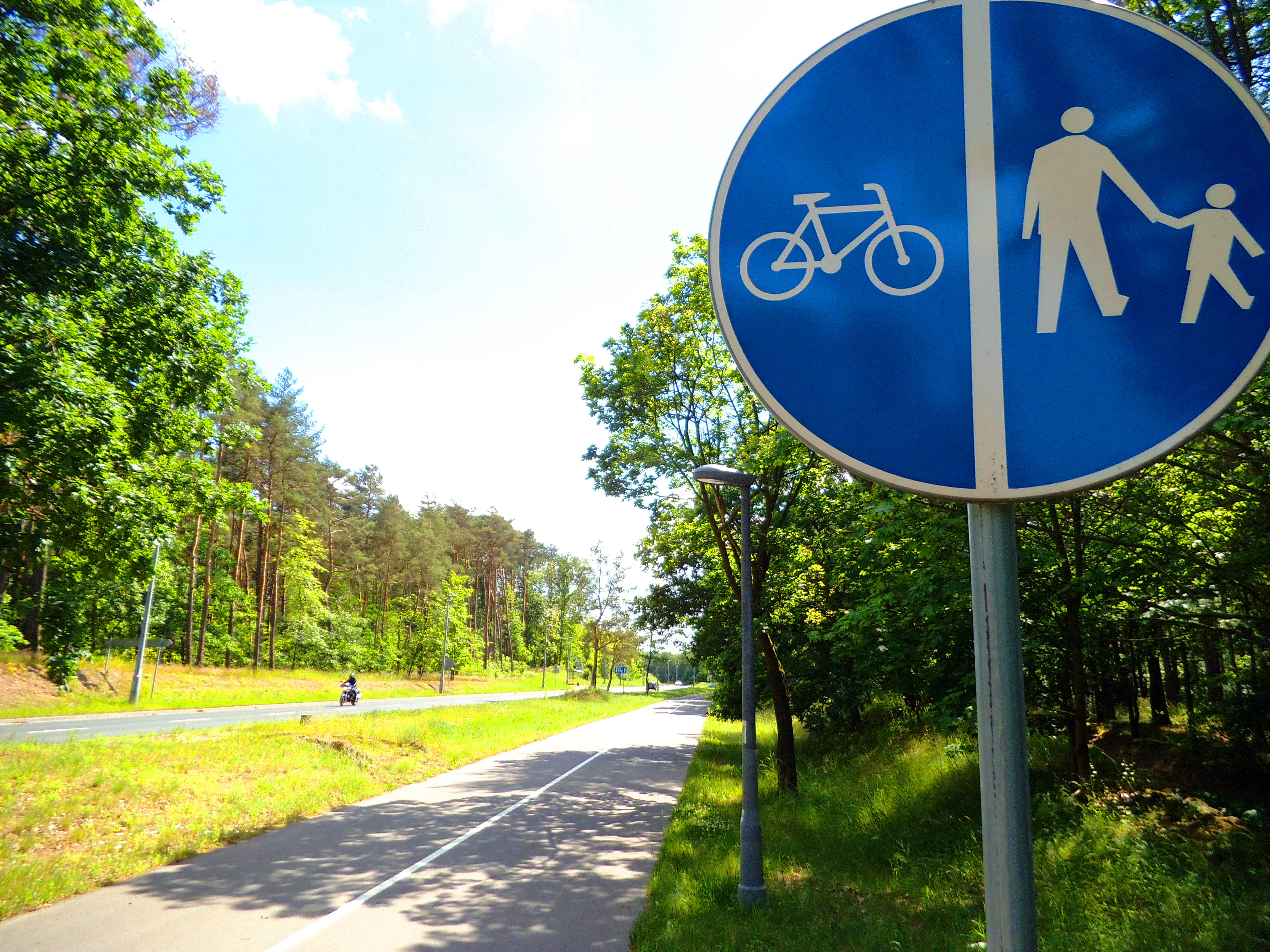 ul. Okrężna w Toruniu